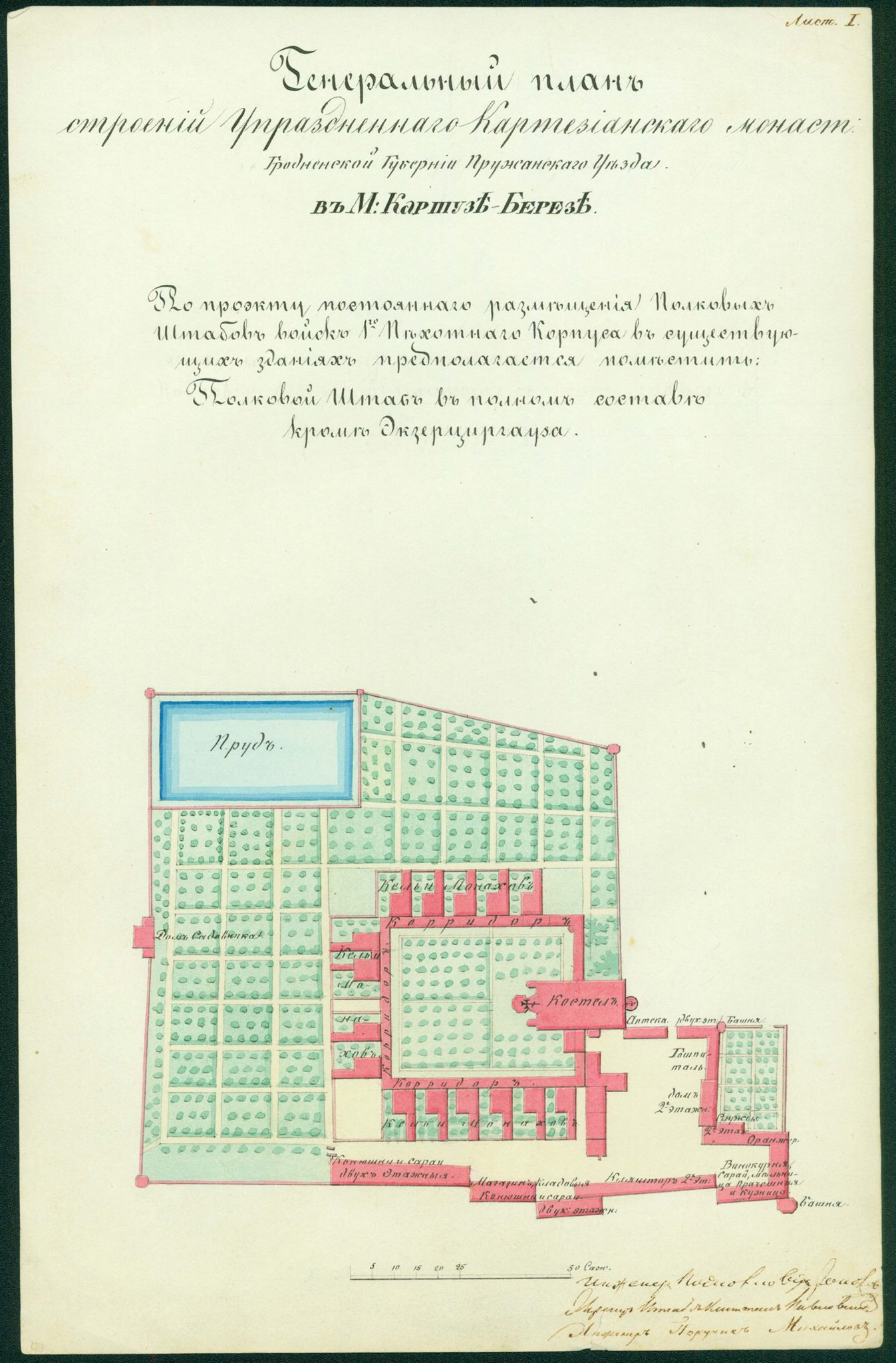 Беларуская (тарашкевіца): Бяроза Картуская (Biaroza Kartuskaja), вуліца Кляштарная (vulica Klaštarnaja). Кляштар картузаў